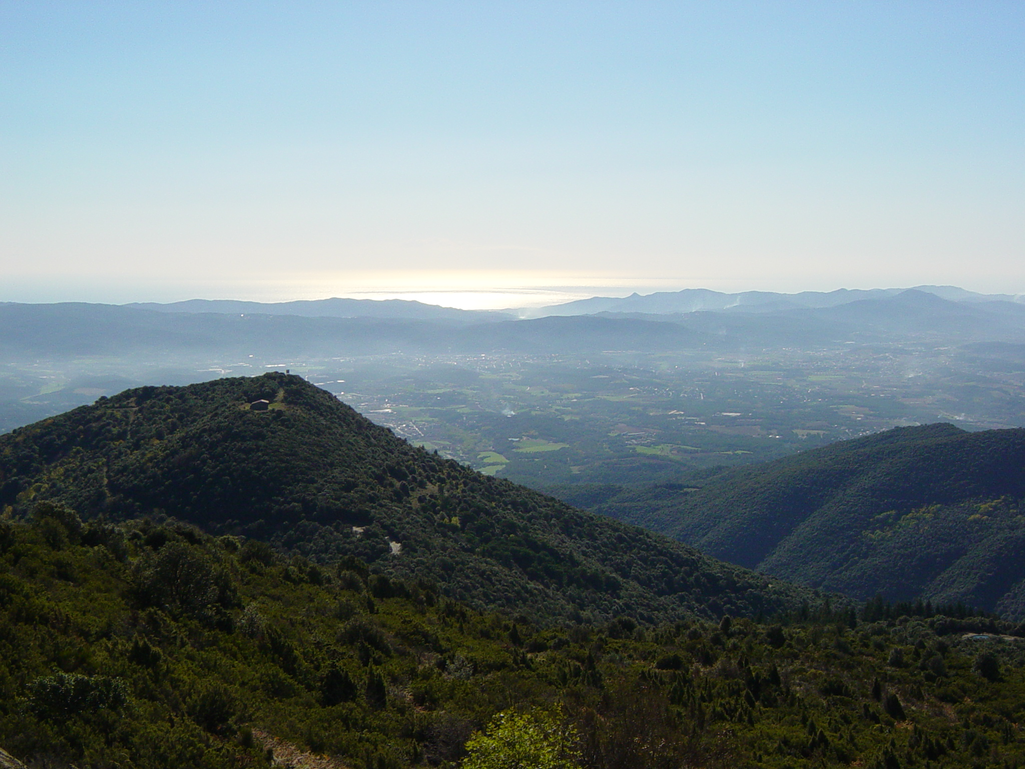 Turó de Sant Elies vist des del turó de la Cova (Sant Pere de Vilamajor)